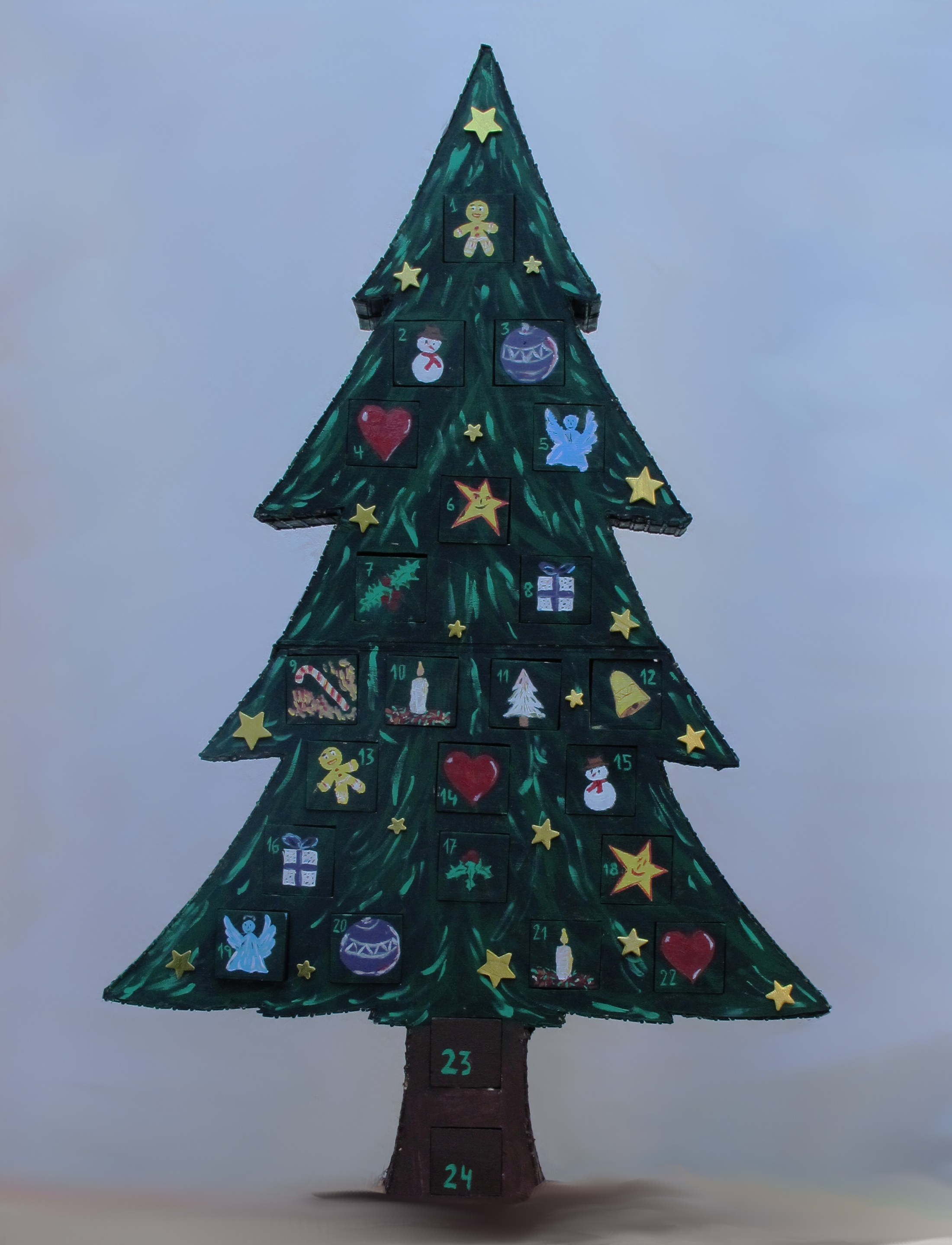 Calendario de Adviento. Adventskalender